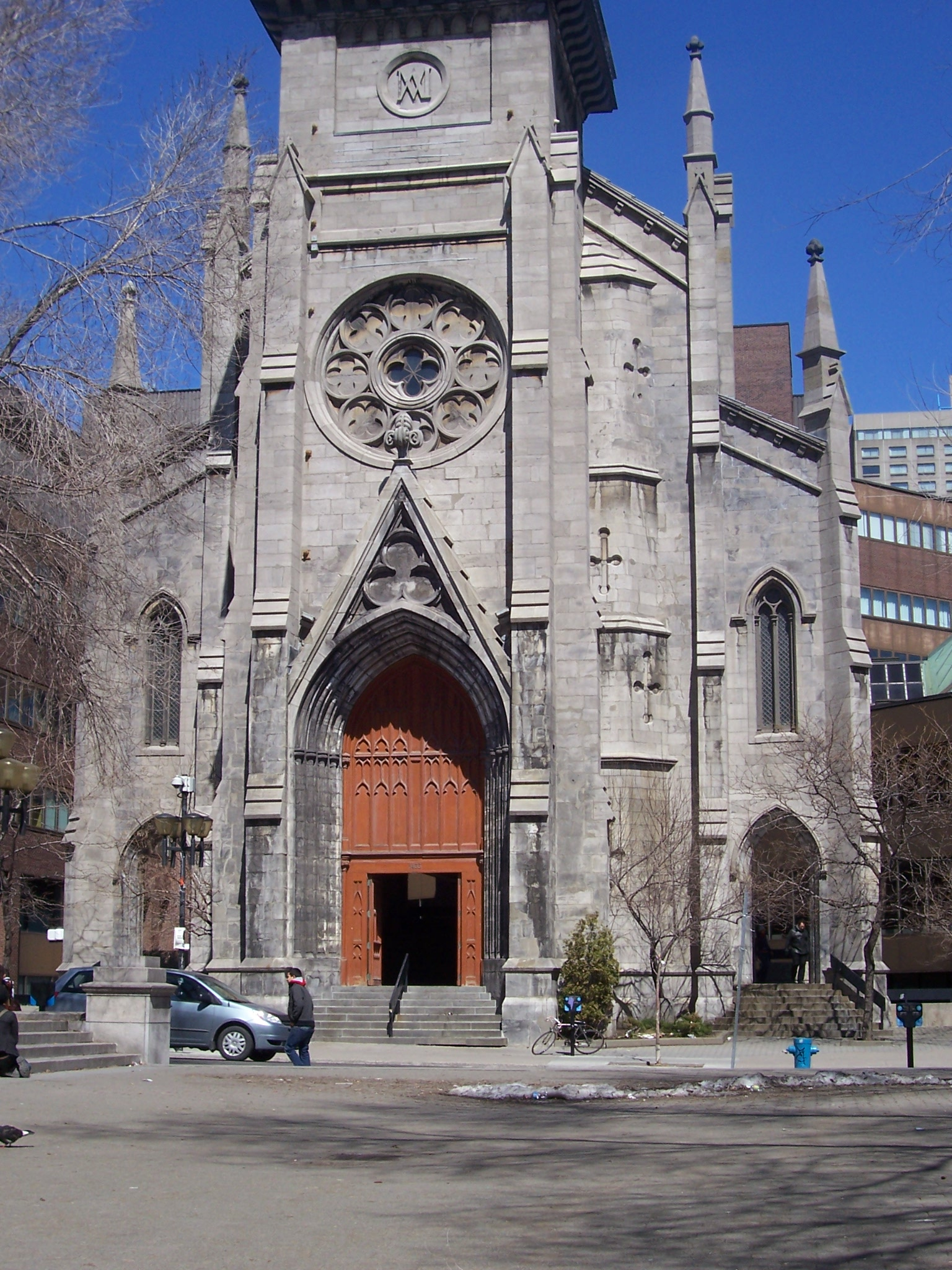 Porte du clocher de l'ancienne cathédrale Saint-Jacques de Montréal